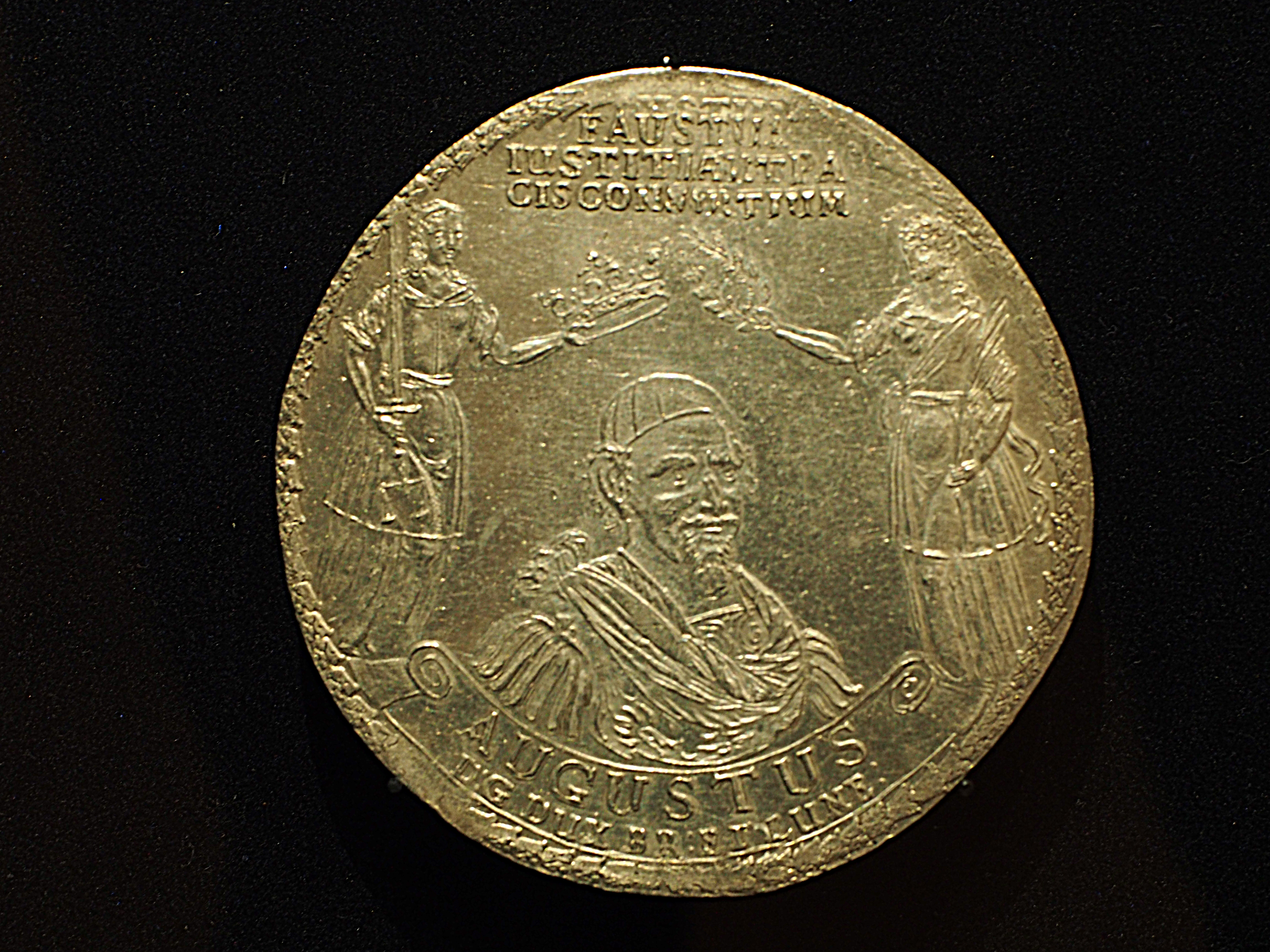 Silber, 114.62g, Welter 781A